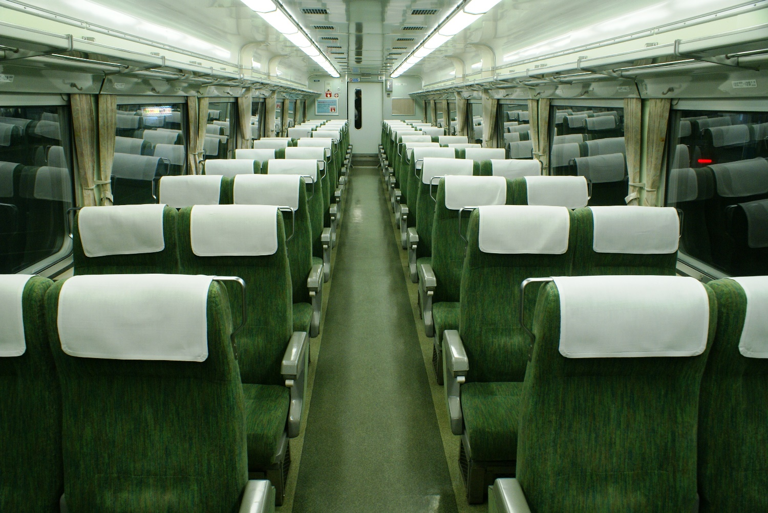 岡山駅にて撮影